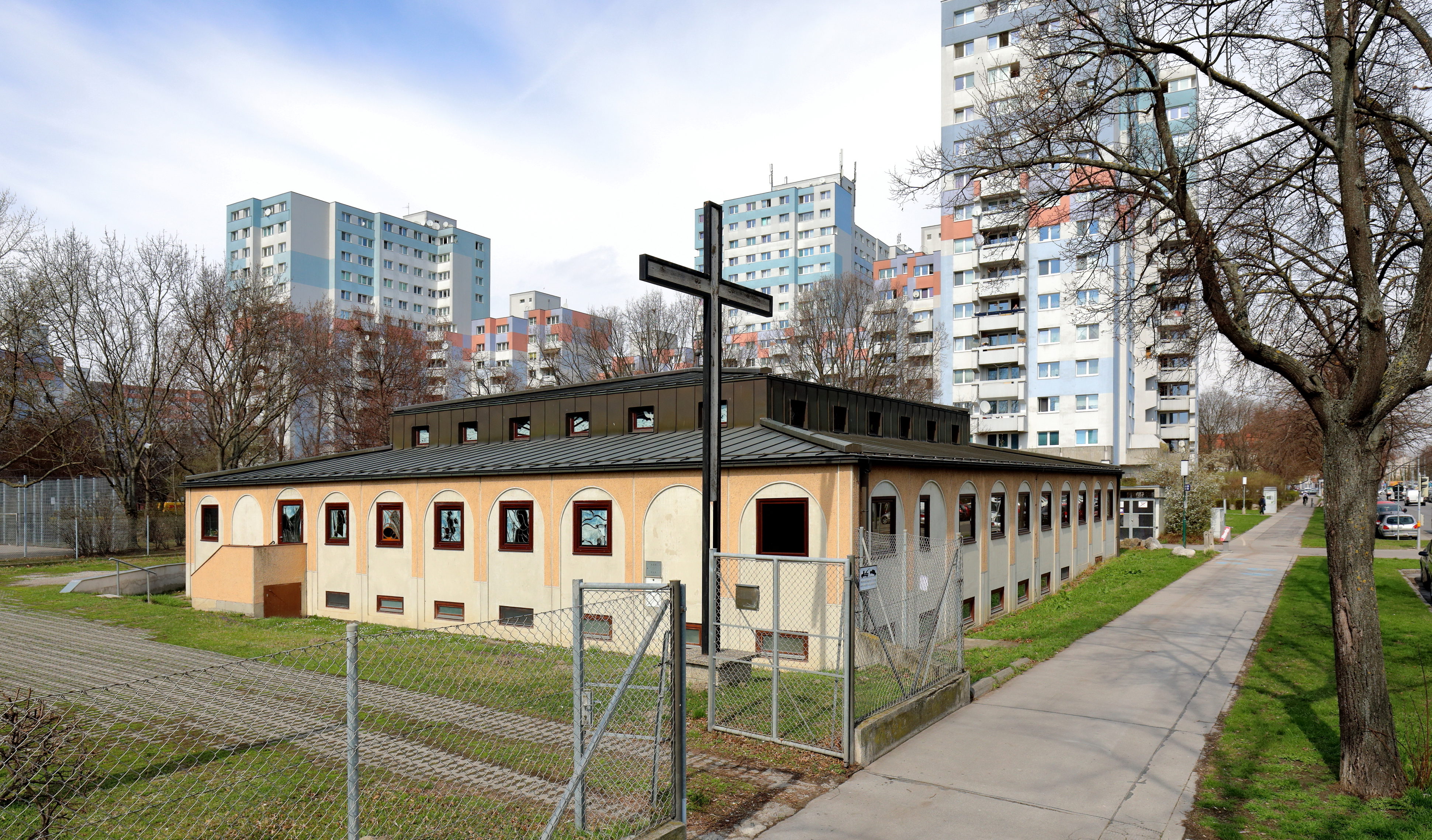 Südansicht der Seelsorgestation und Filialkirche St. Martin im 21. Wiener Bezirk Floridsdorf. Die kirchliche Mehrzweckhalle wurde von 1979 bis 1980 im Zuge der Errichtung des Gemeindebaus Franz-Koch-Hof nach Plänen der Architekten-Planungsgemeinschaft IGIRIEN (Elsa Prochazka, Werner Appelt und Franz E. Kneissl) errichtet.